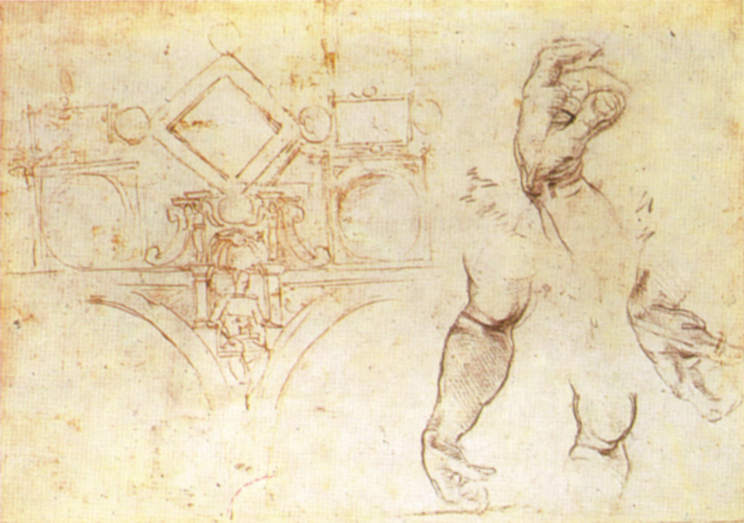 Michelangelo, schizzo del primo progetto della volta della sistina, british museum